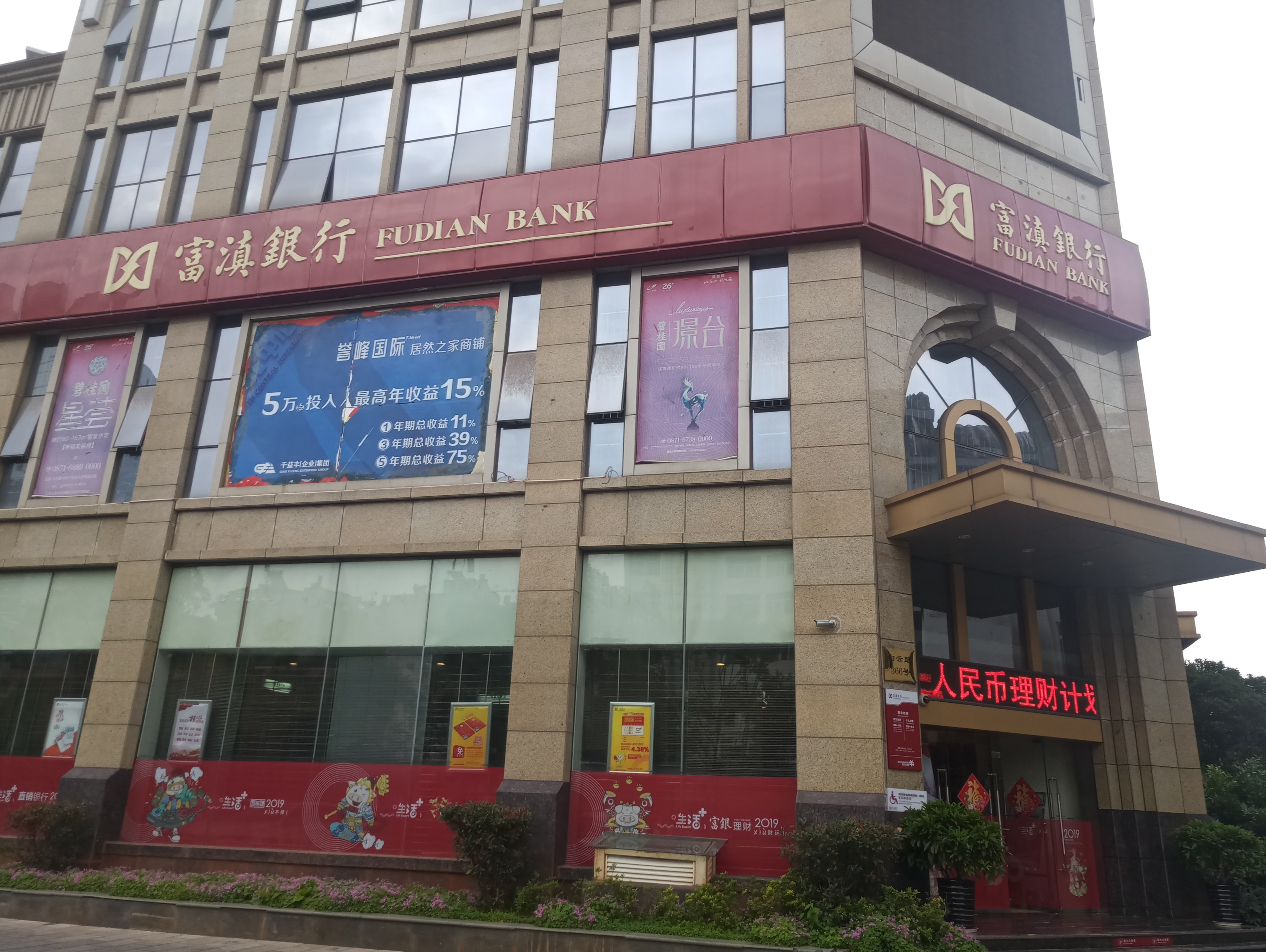 中文（中国大陆）: 富滇银行-昆明市盘龙区白云支行